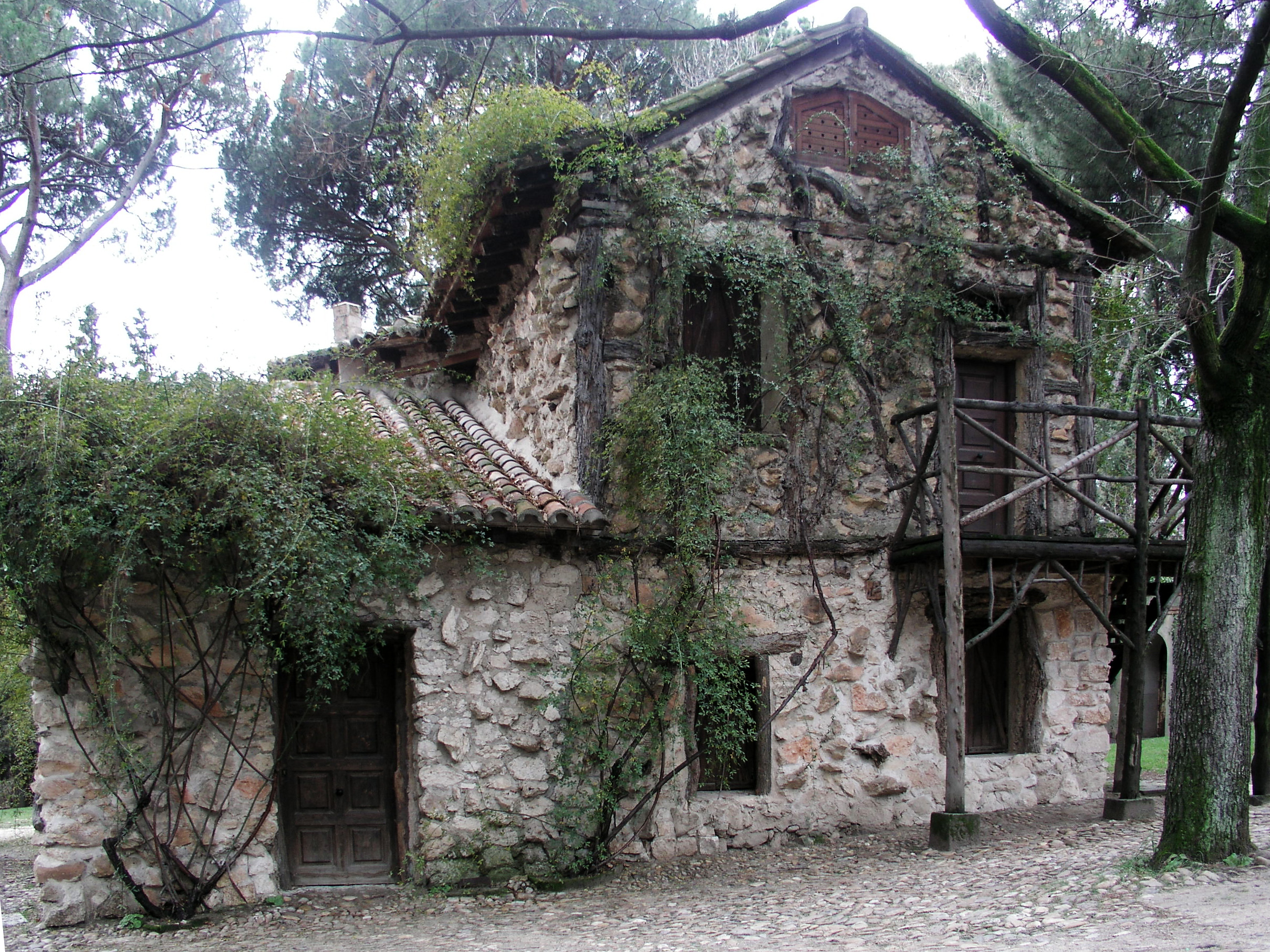 Jardín El Capricho, Madrid, Spain